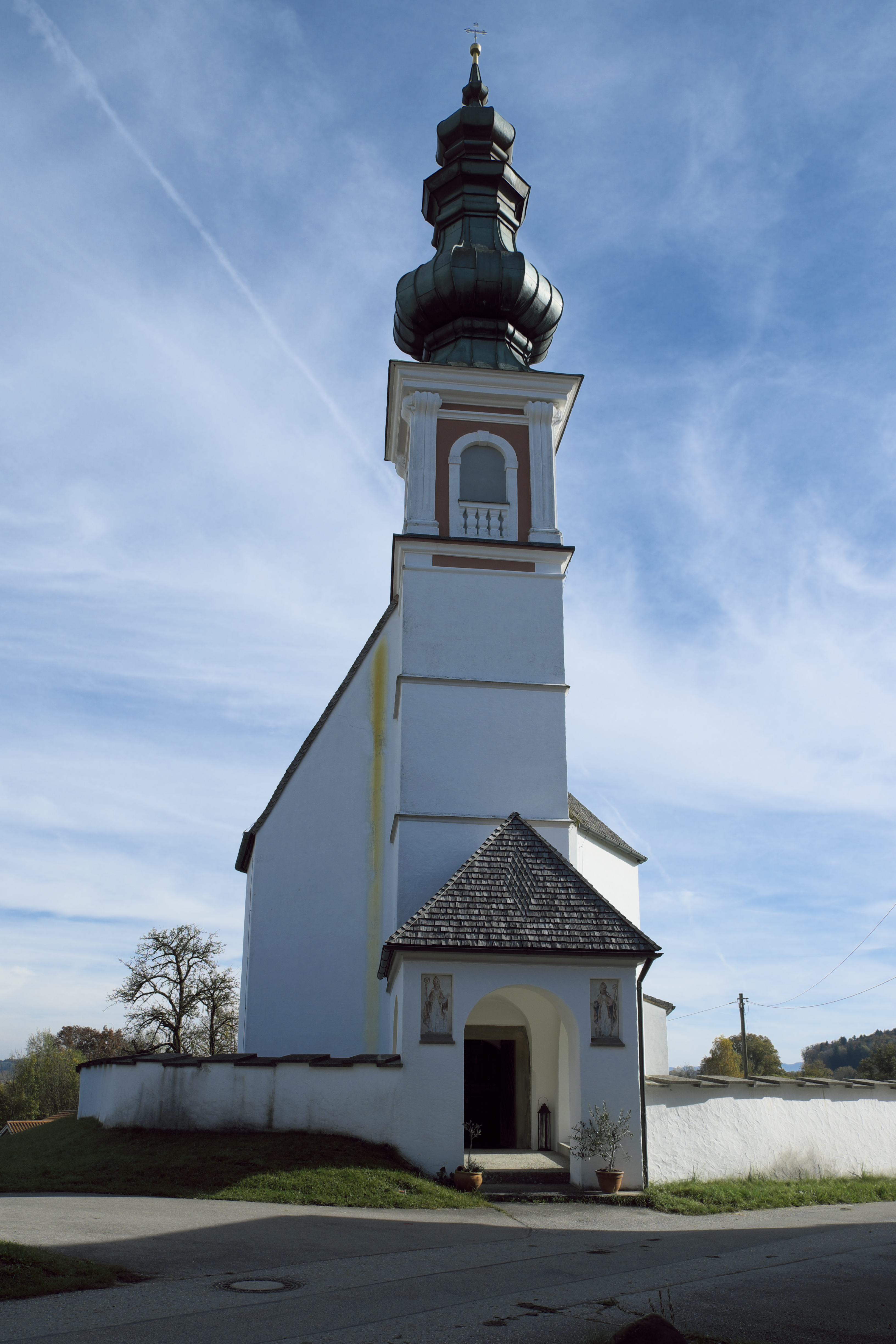 Katholische Filialkirche St. Rupertus in Gaden (Waging am See) im Landkreis Traunstein (Bayern/Deutschland)